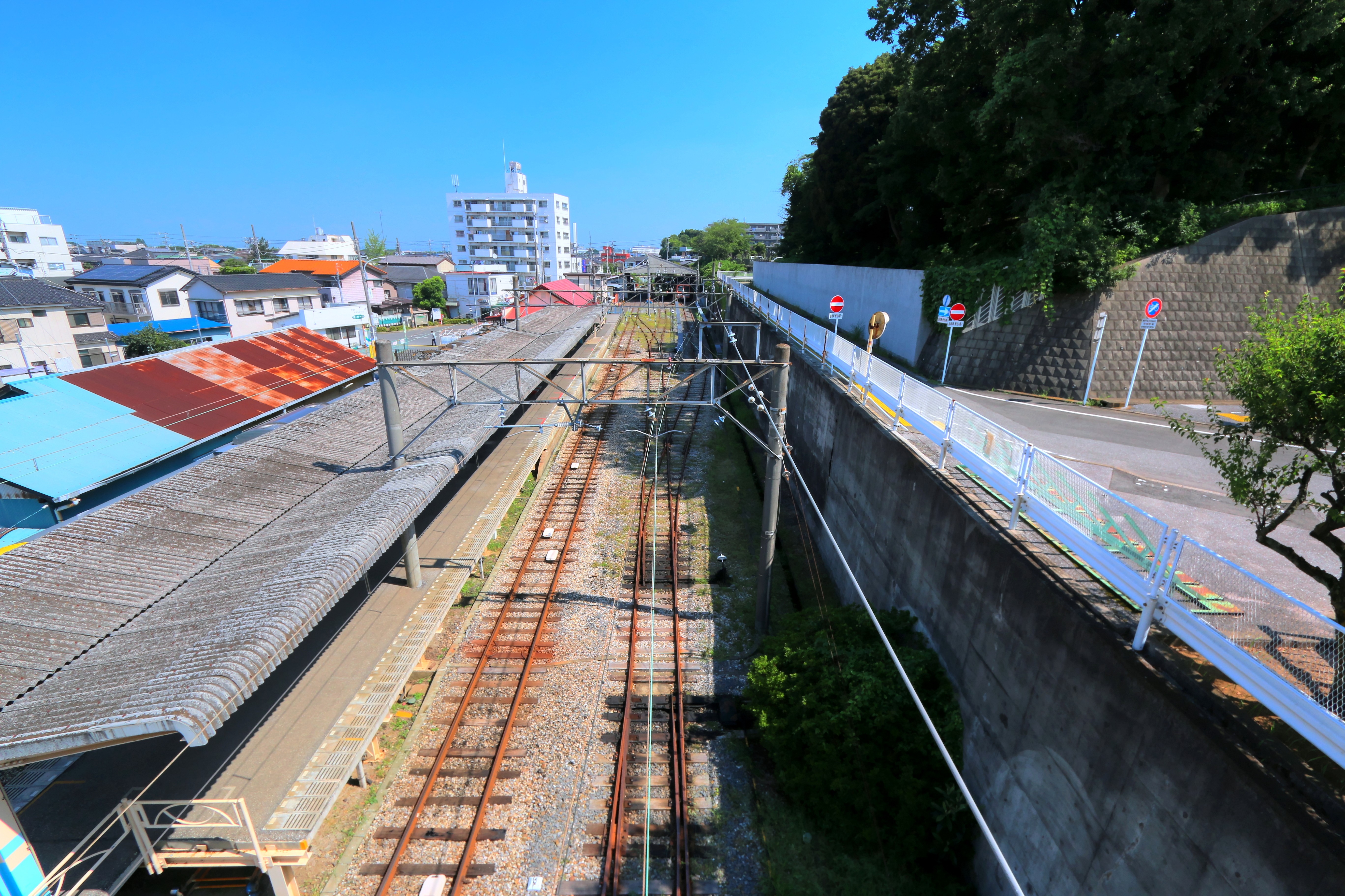 流山駅